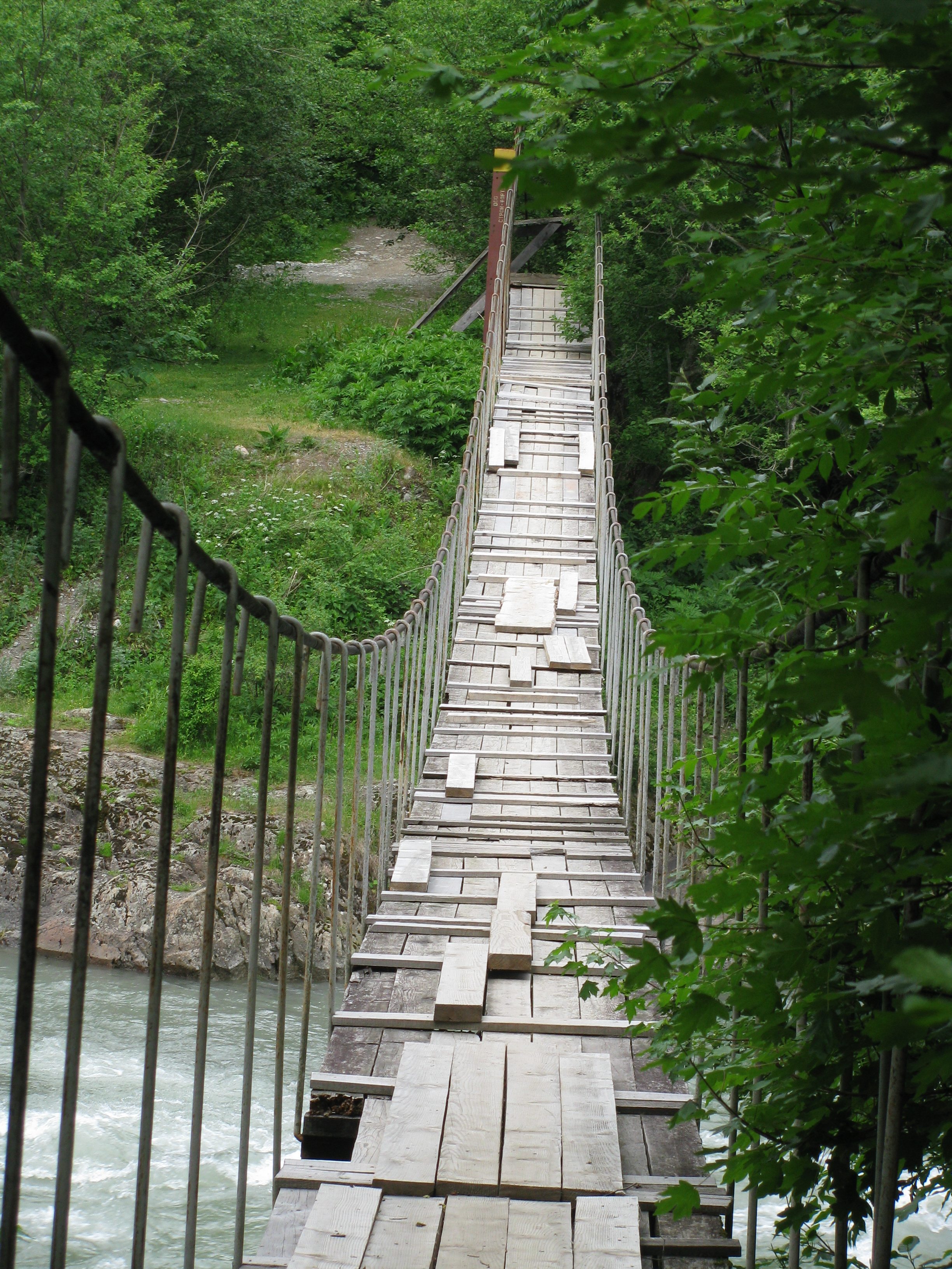 Подвесной мост через Малую Лабу